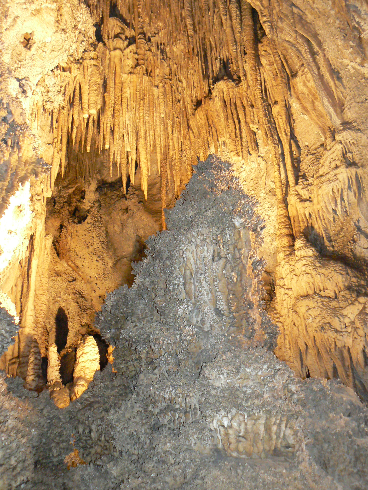 A picturesque niche in Uhlovitza Cave, Bulgaria